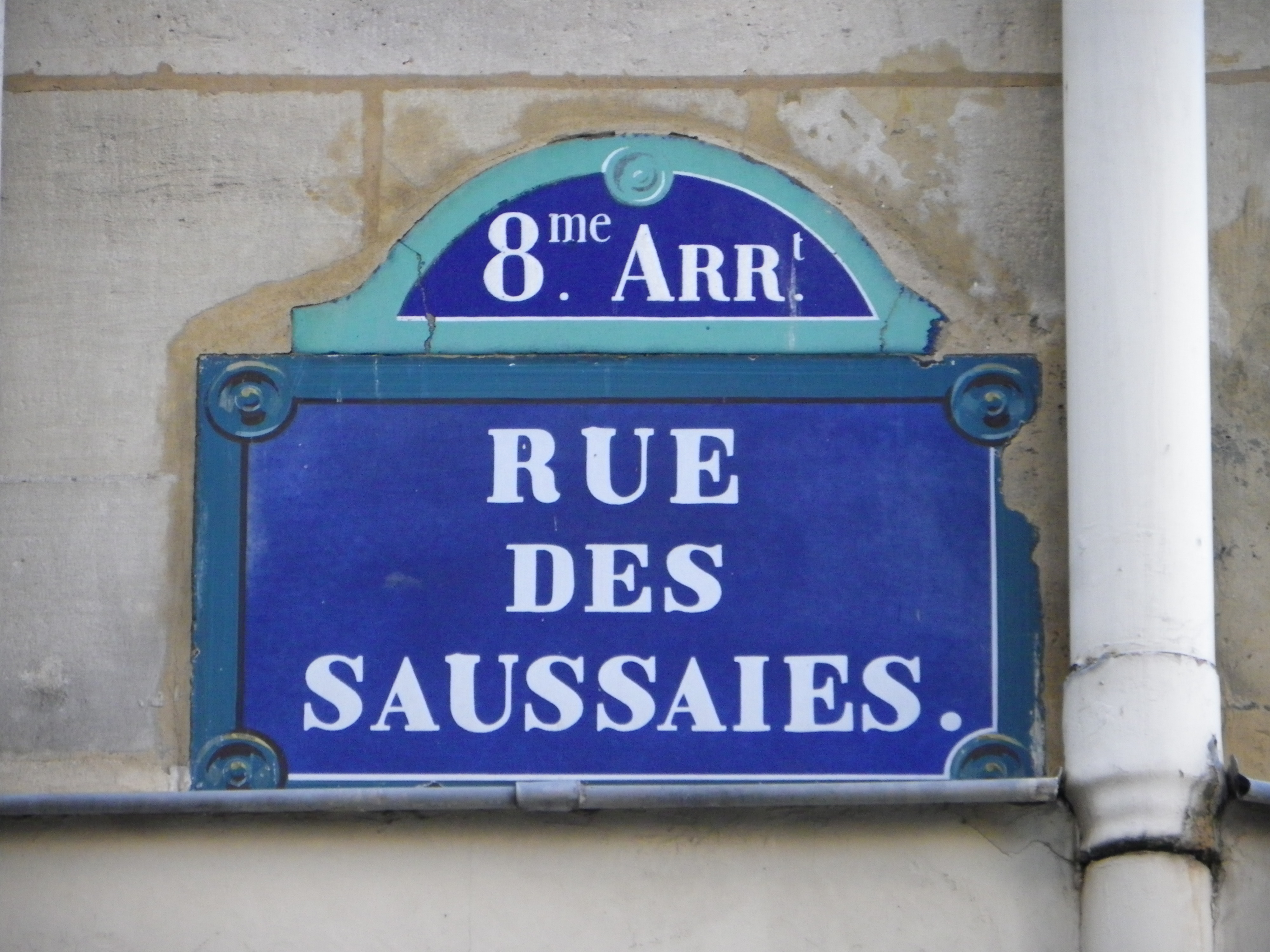 Plaque rue des Saussaies à Paris